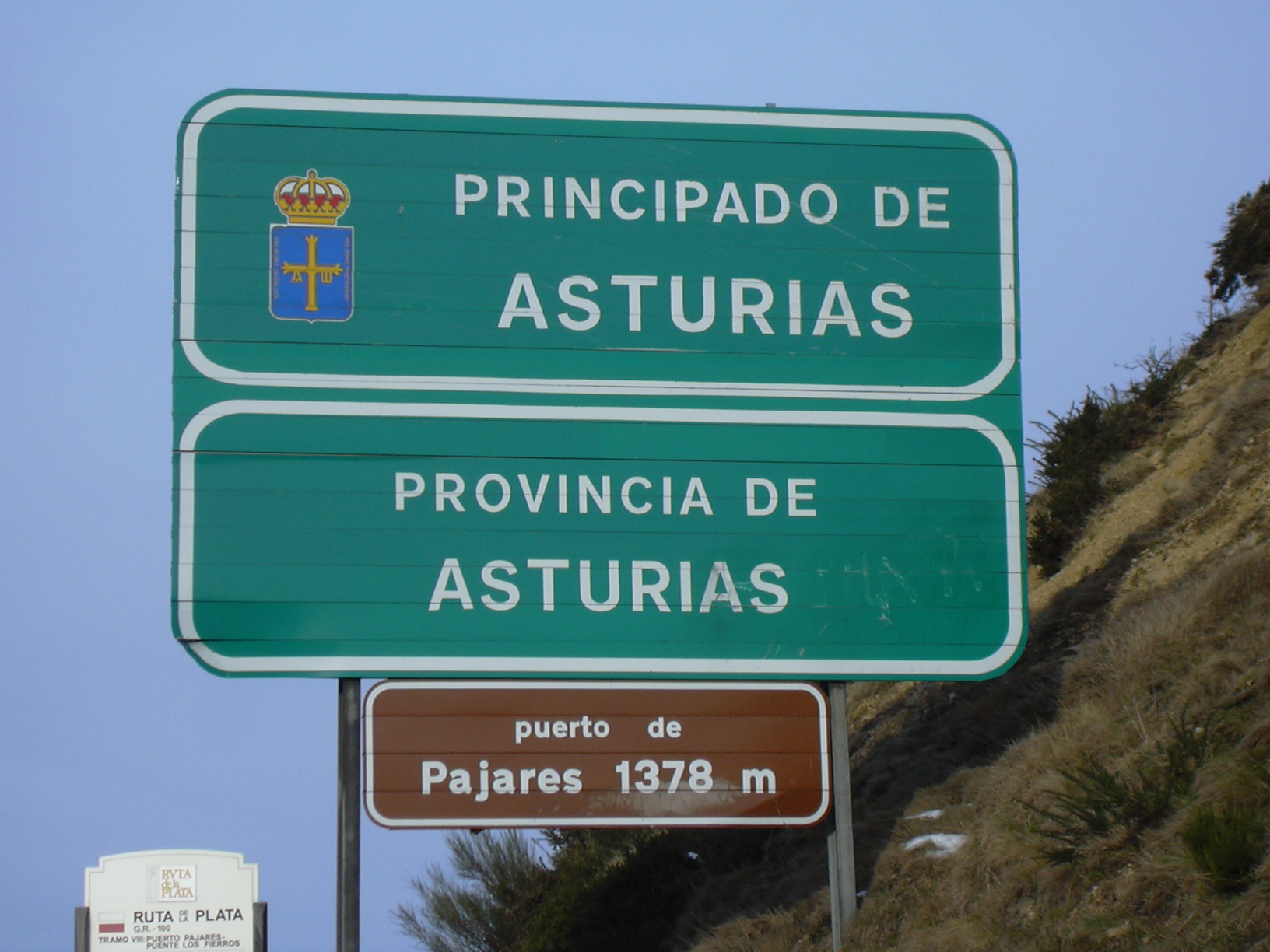 Frontera entre Asturias y León, en el puerto de Pajares.